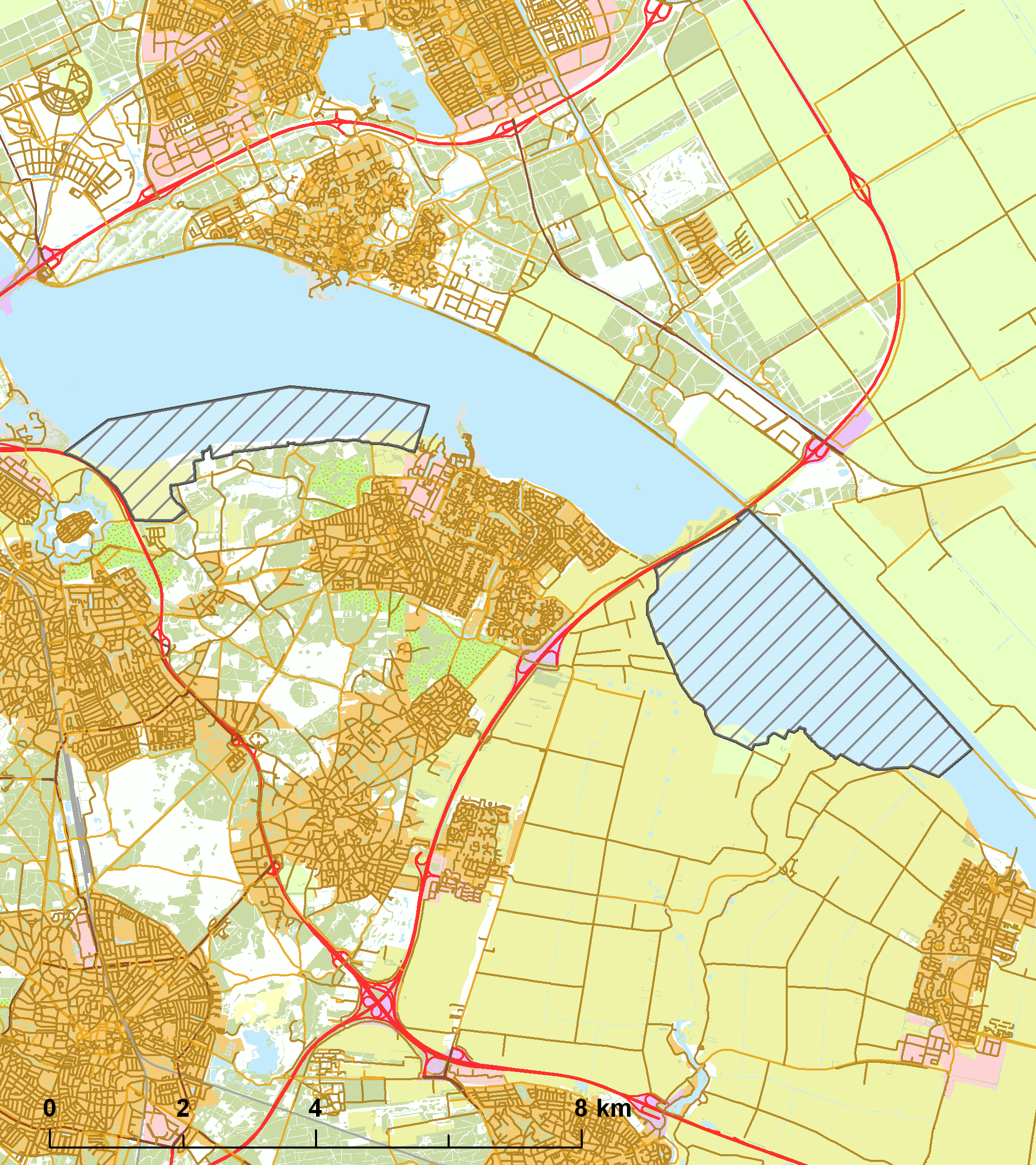 Natura2000 - Eemmeer & Gooimeer Zuidoever.png